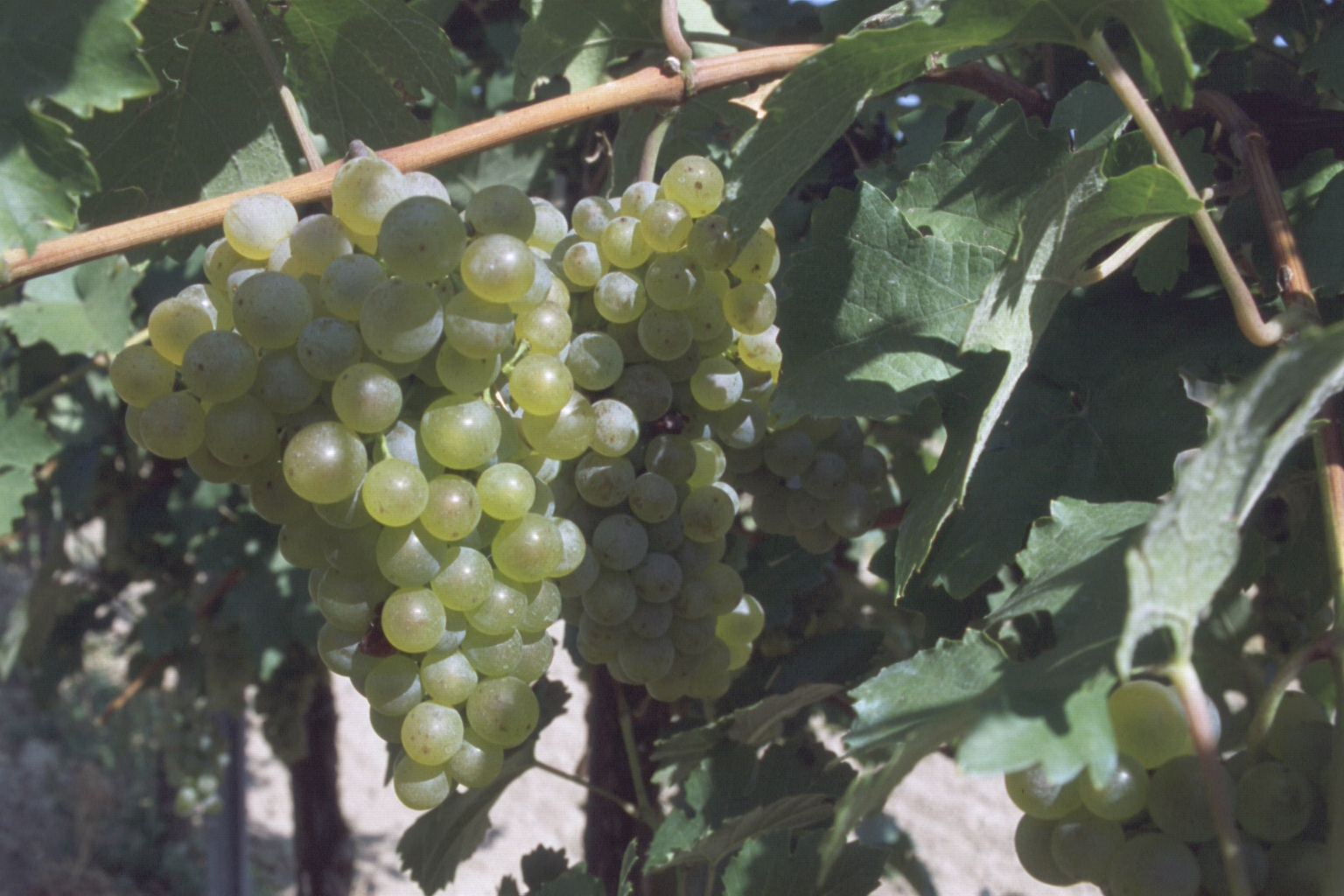 Grüner Veltliner Traben von Hochkultur Lenz Moser